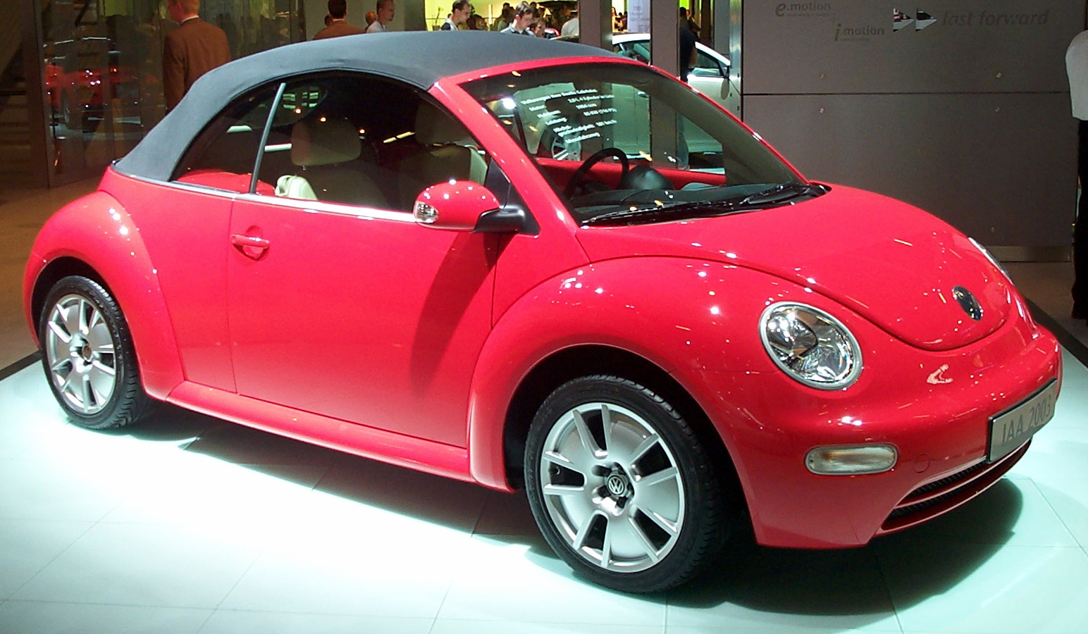 Volkswagen New Beetle Cabriolet at IAA 2003